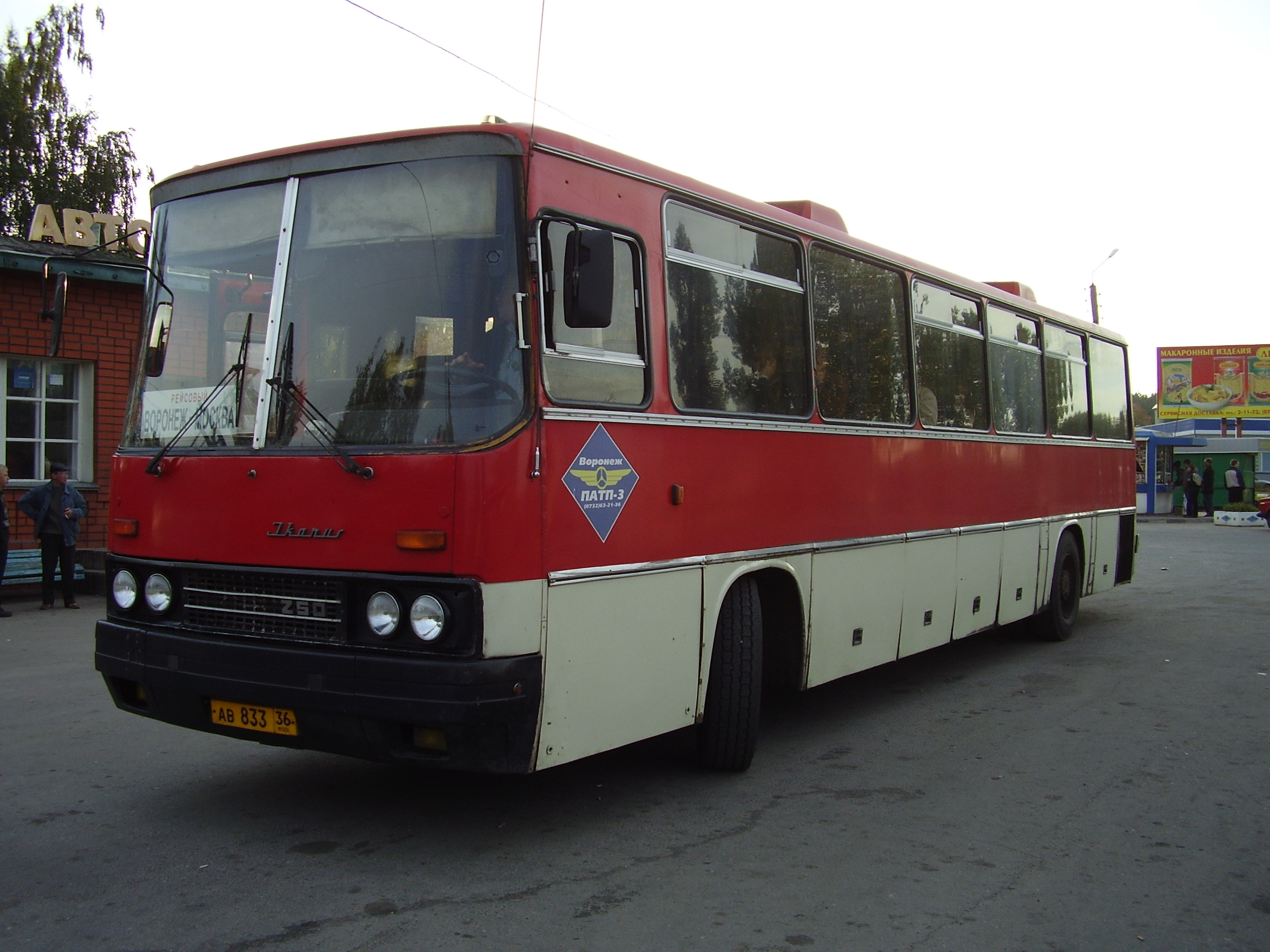 Автобус Ikarus-250